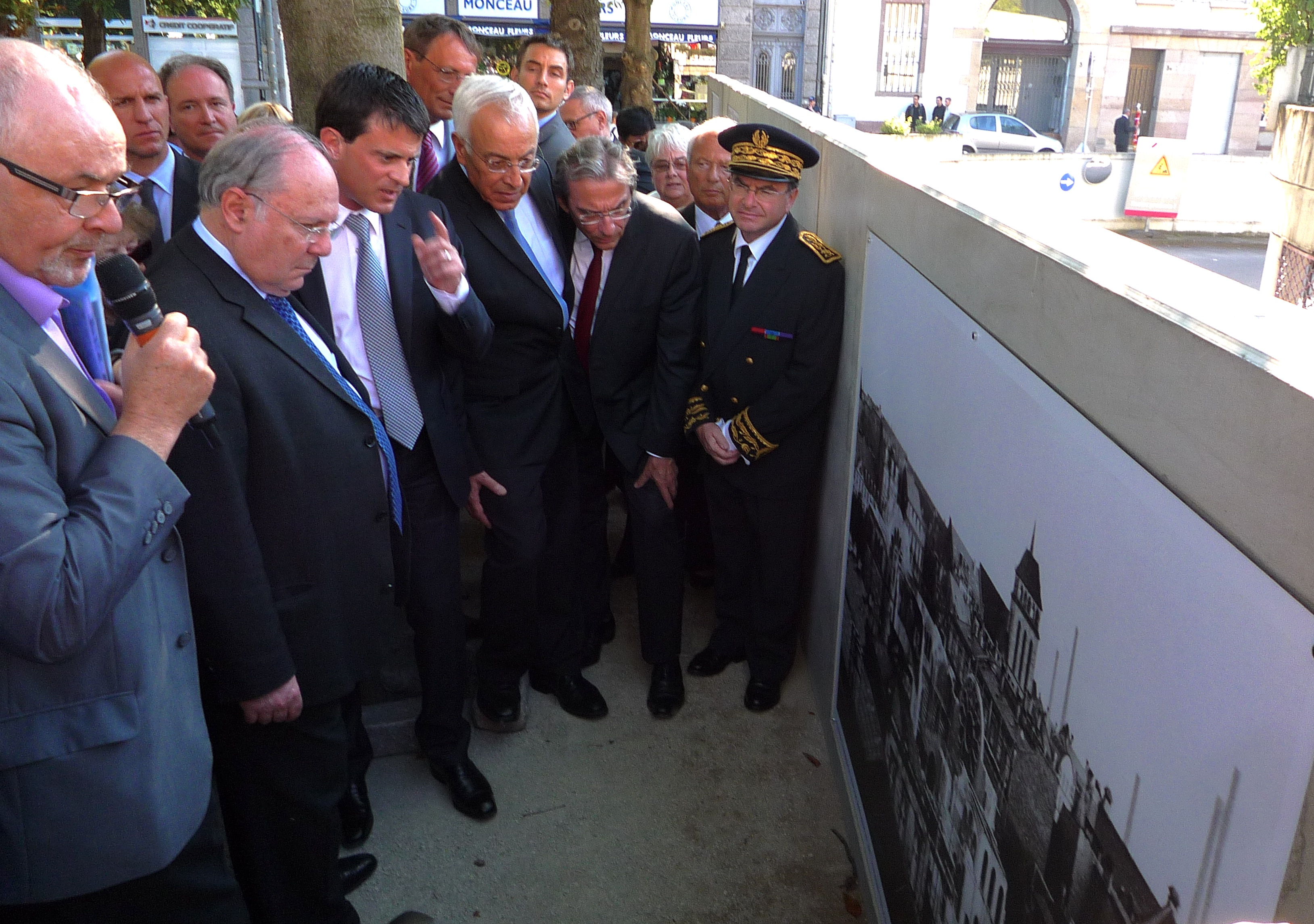 Strasbourg inauguration de l’allée des Justes : de gauche à droite : Jean Daltroff, historien ; Richard Prasquier, président du Crif ; Manuel Valls, ministre de l'intérieur ; Yossi Gal, ambassadeur d’Israël en France ; Roland Ries, sénateur maire de Strasbourg ; Jean-Raphaël Hirsch, président du Comité français pour Yad Vashem et Pierre-Etienne Bisch, préfet de la région Alsace.